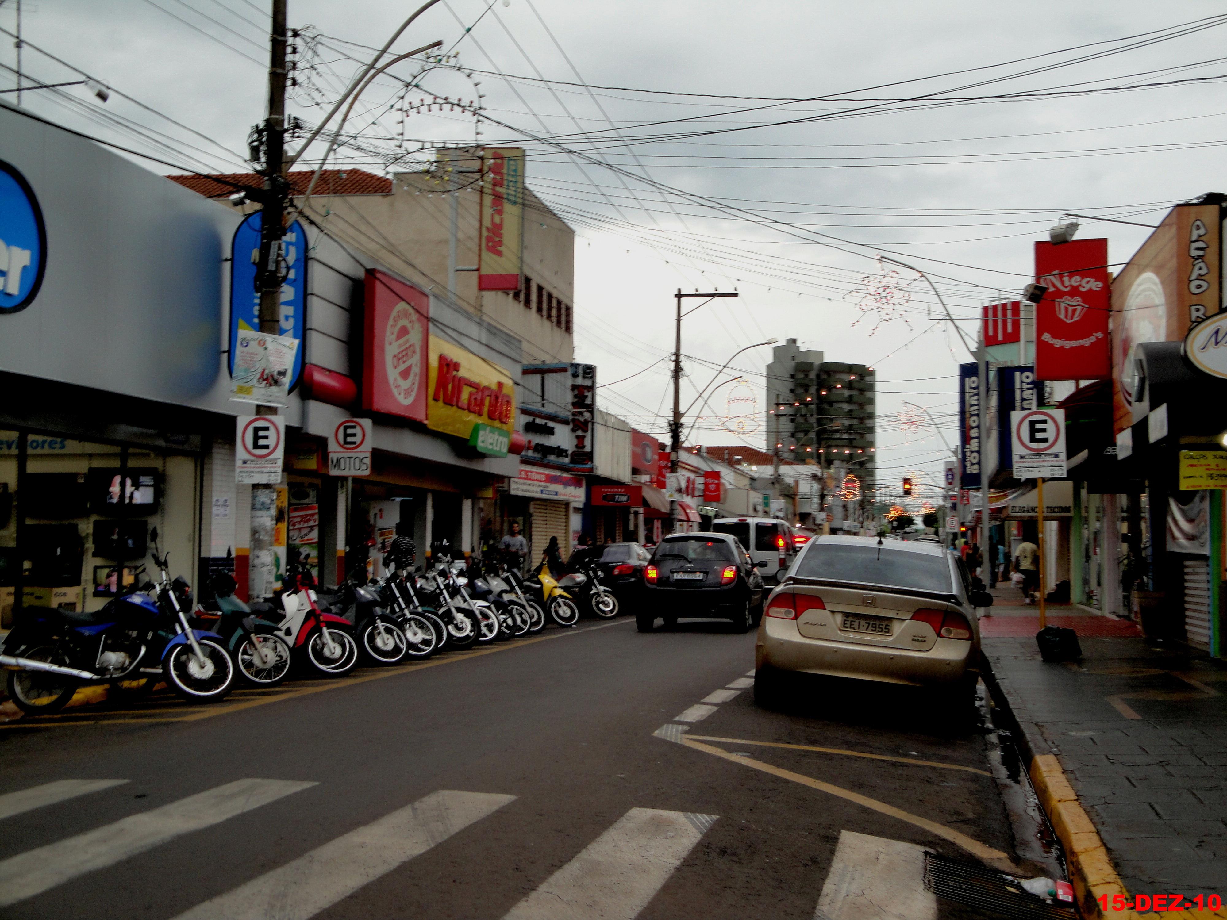 Iluminação de Natal na Rua Barão do Rio Branco em Sertãozinho